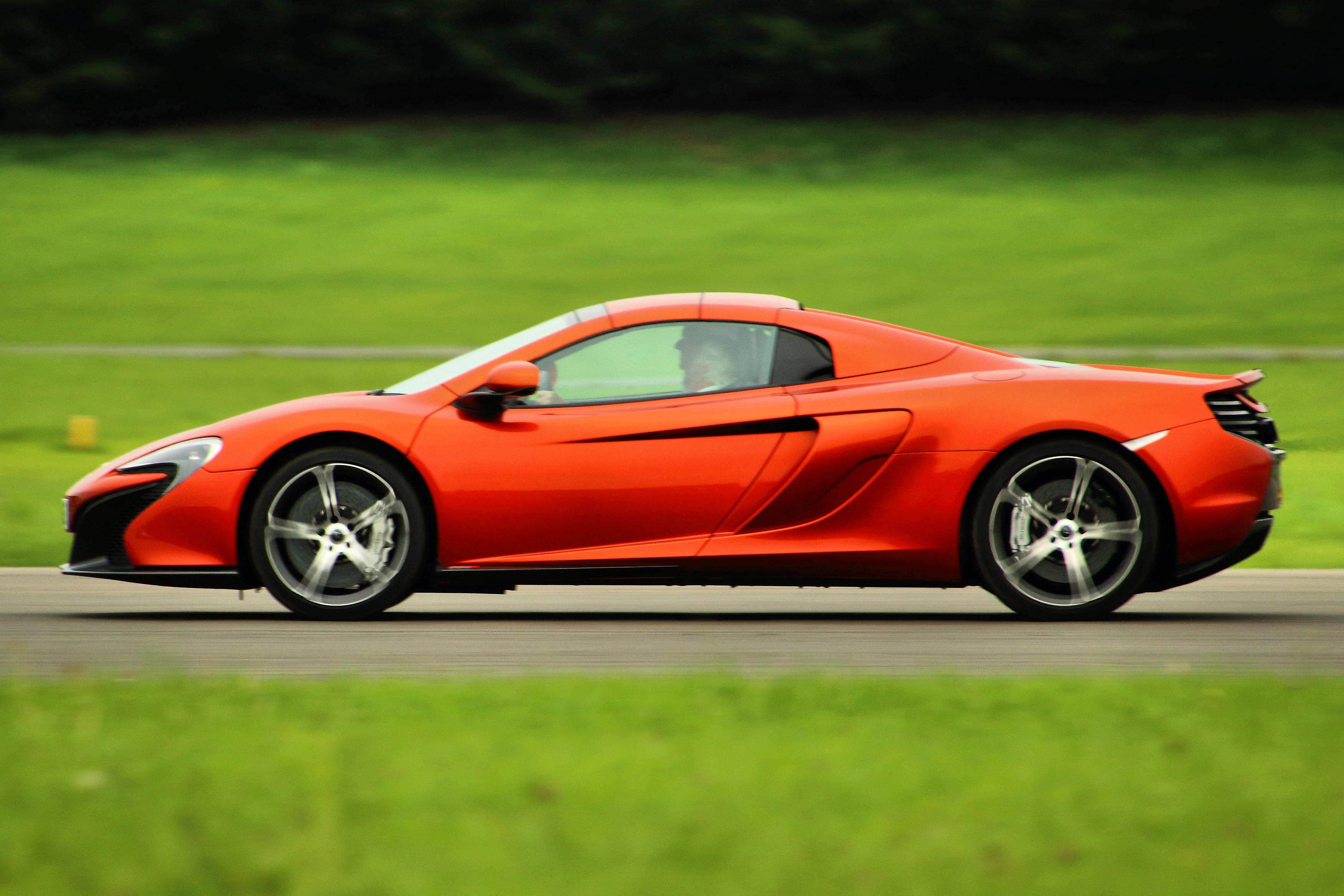 McLaren 650S - Dunsfold 2015